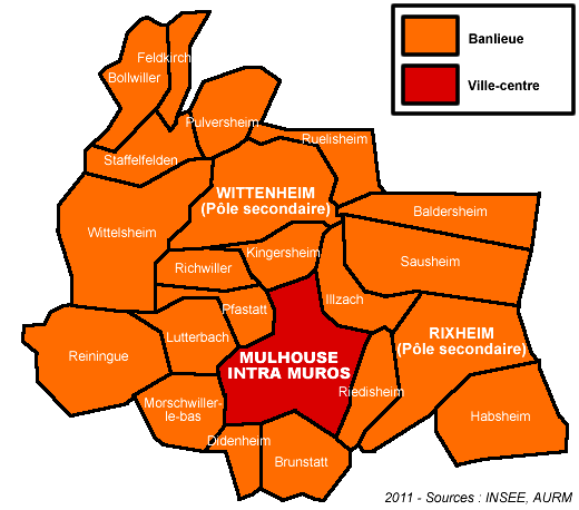 Unité urbaine de Mulhouse